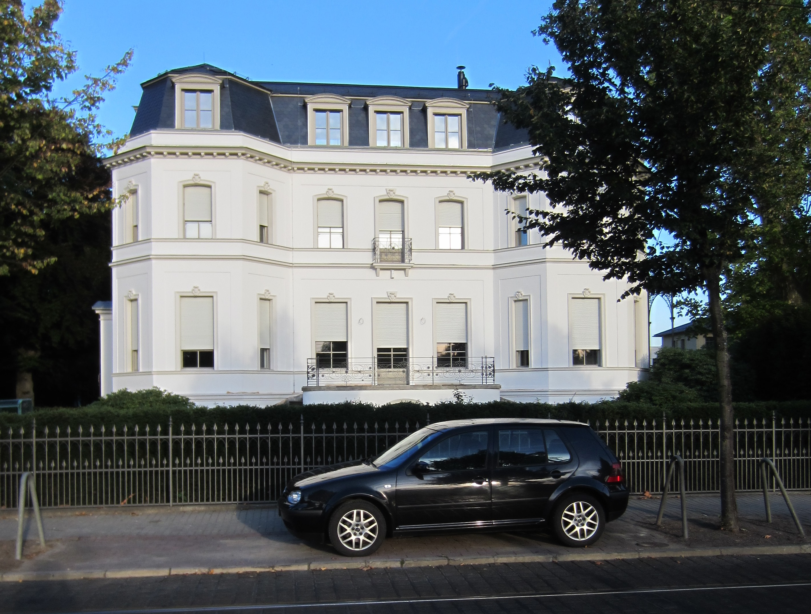 Denkmalgeschützte Villa Mühlberg in Potsdam, Puschkinallee 4, nach dem Entwurf des Architekten Reinhold Persius führte Hofmaurermeister Heinrich Zech (1826–um 1899) den Bau 1872/73 aus